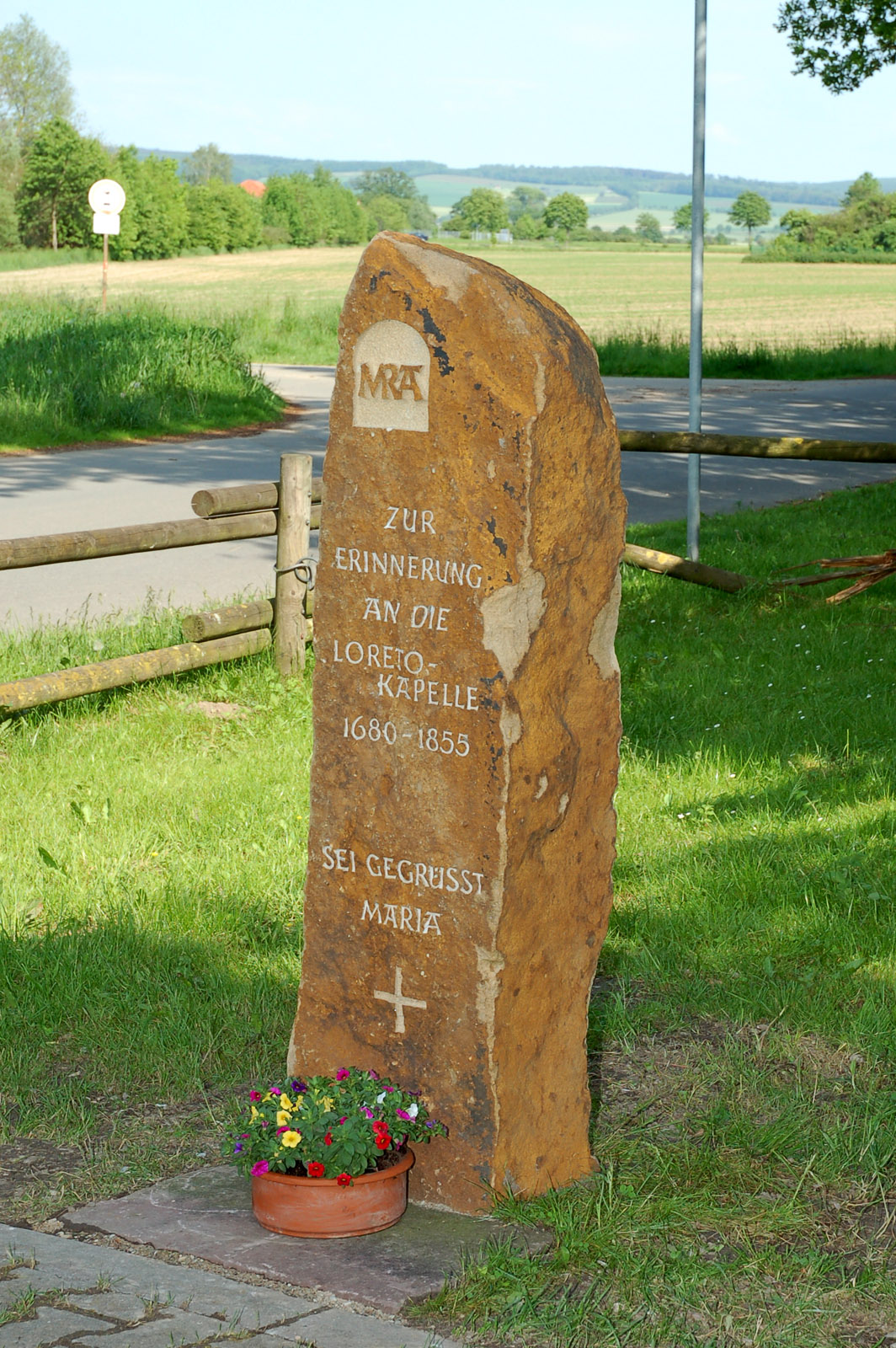 Stele zum Gedenken an die Loretokapelle (1680-1855), die an dieser Stelle in Marienloh stand. Initiiert und am 20. Mai 2012 durch Pfarrer Heinz Josef Löckmann eingeweiht. Bild aus dem Archiv der Heimatfreunde Marienloh, Ralf-Peter Fietz.